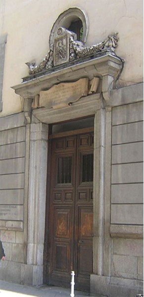 Antigua sede de la Escuela Técnica Superior de Arquitectura de Madrid (España).